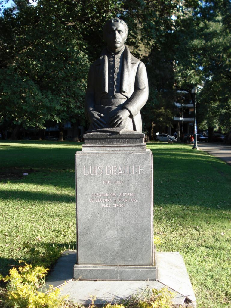 Busto de Luis Braille en la Ciudad de Buenos Aires, Argentina.